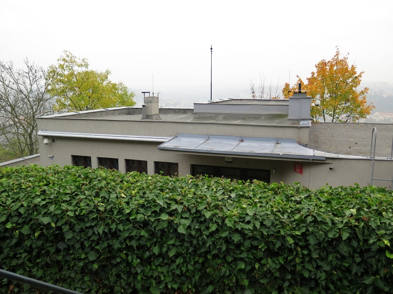 Vila Skalní 10, Skalní 327/10, Barrandov.